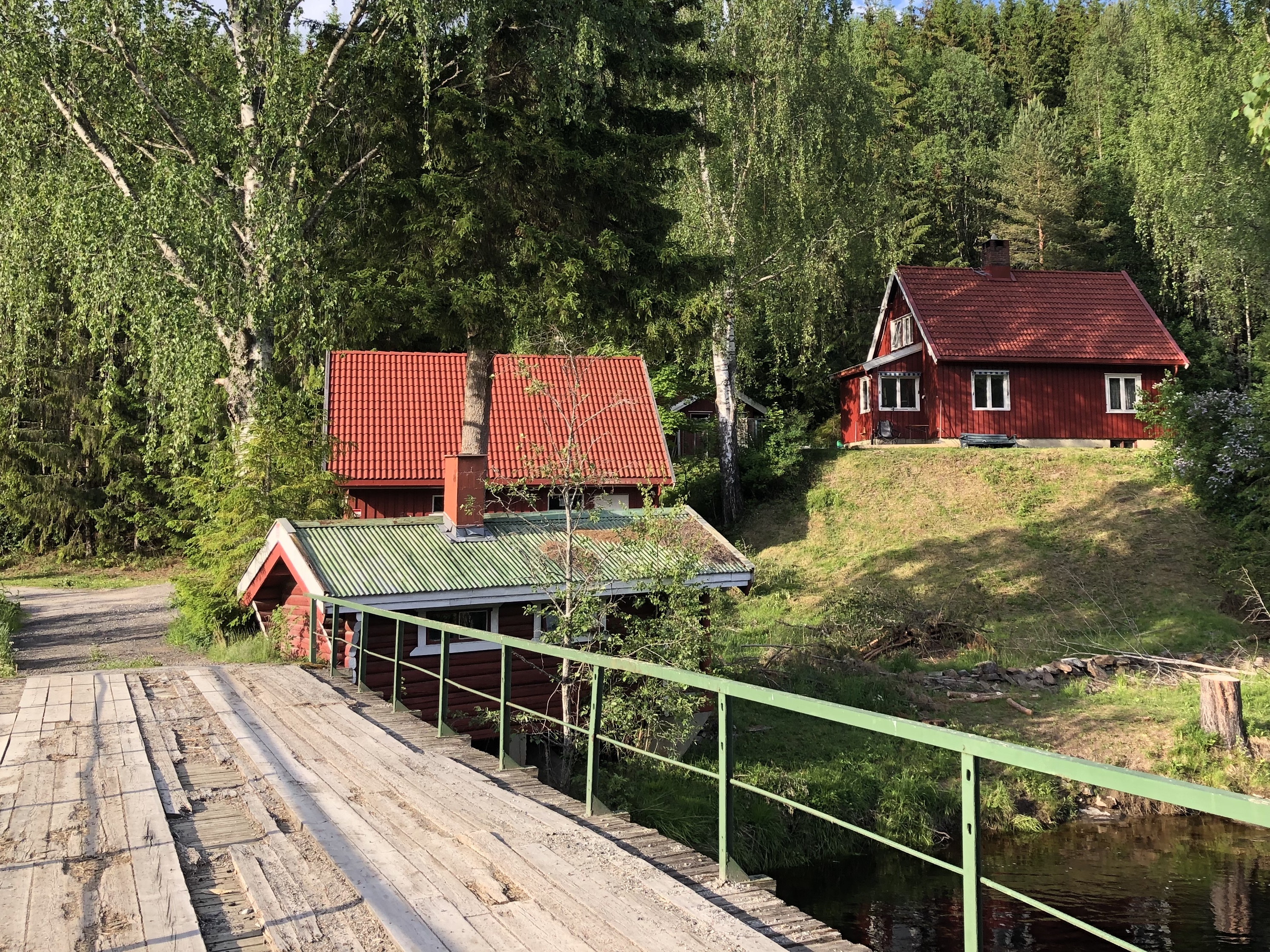 Heiernveien 5, Ringerike